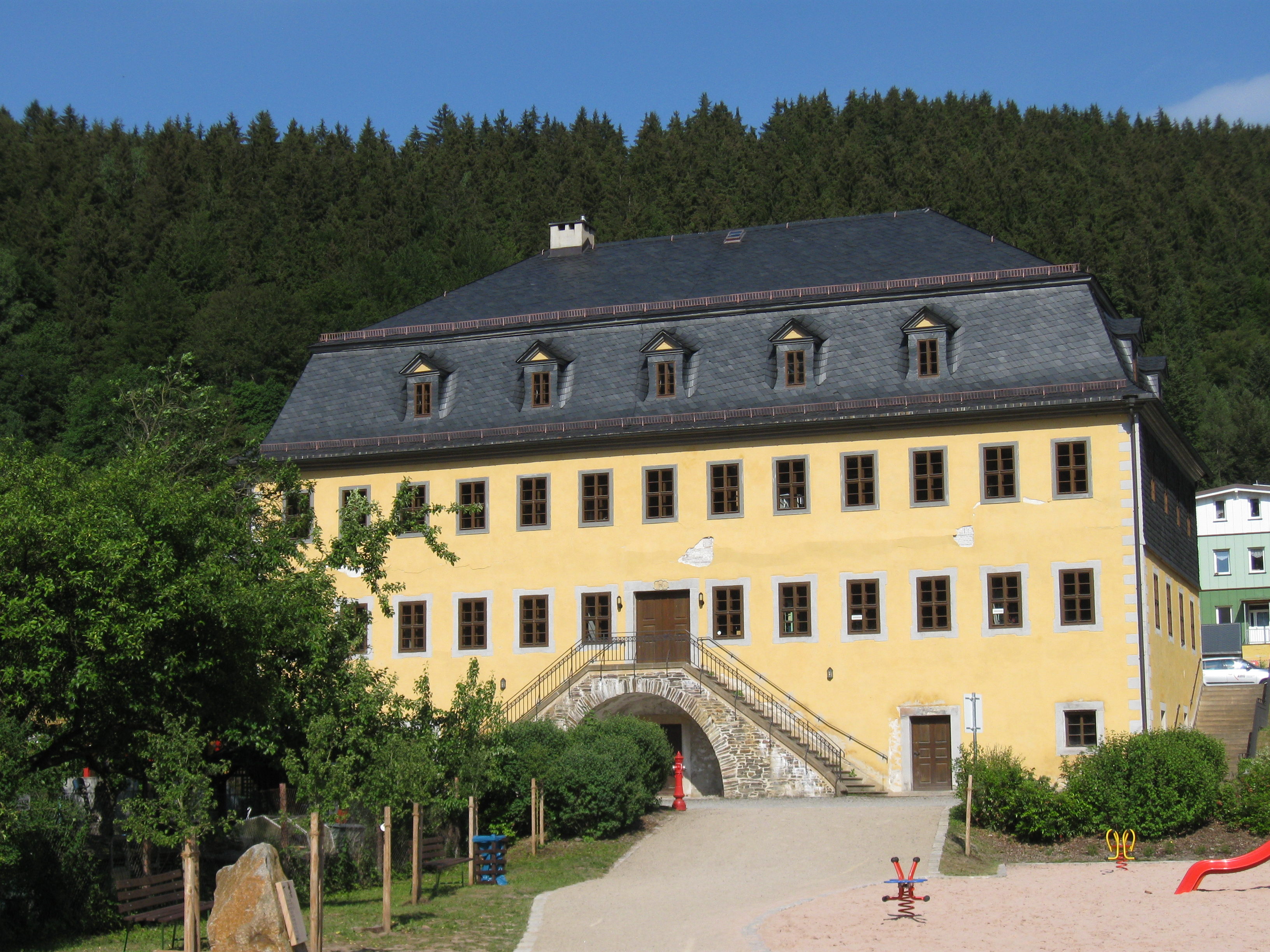 Das Herrenhaus wurde 1760 von Johann Wolfgang Hammann erbaut.